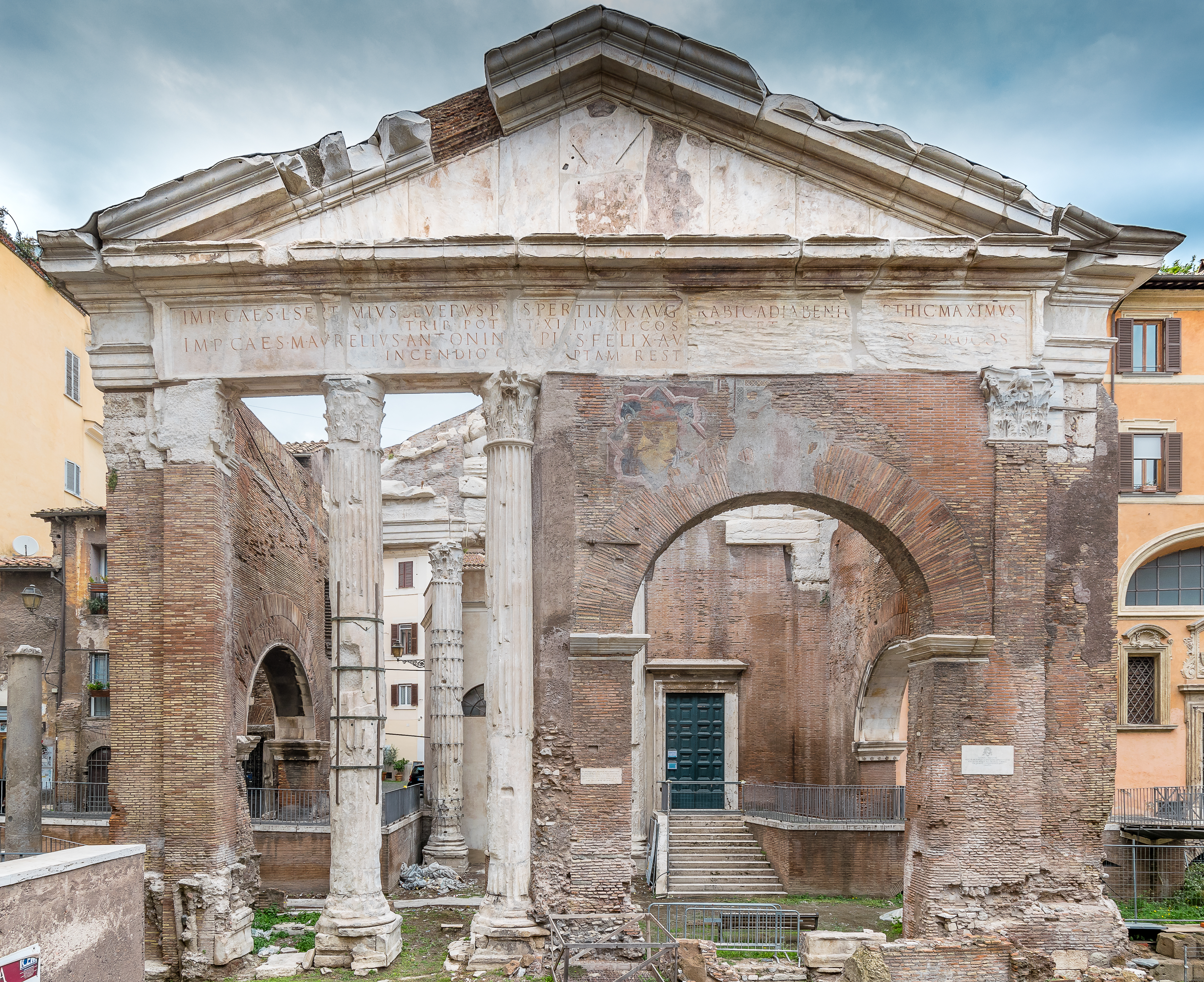 Die Portikus der Octavia in Rom (Haupteingang)